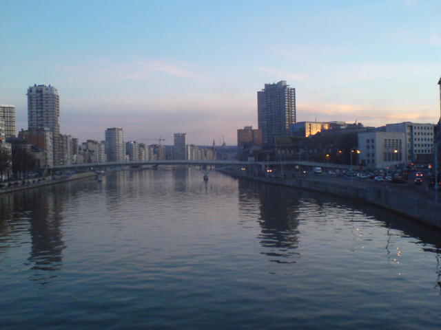 La Meuse à Liège